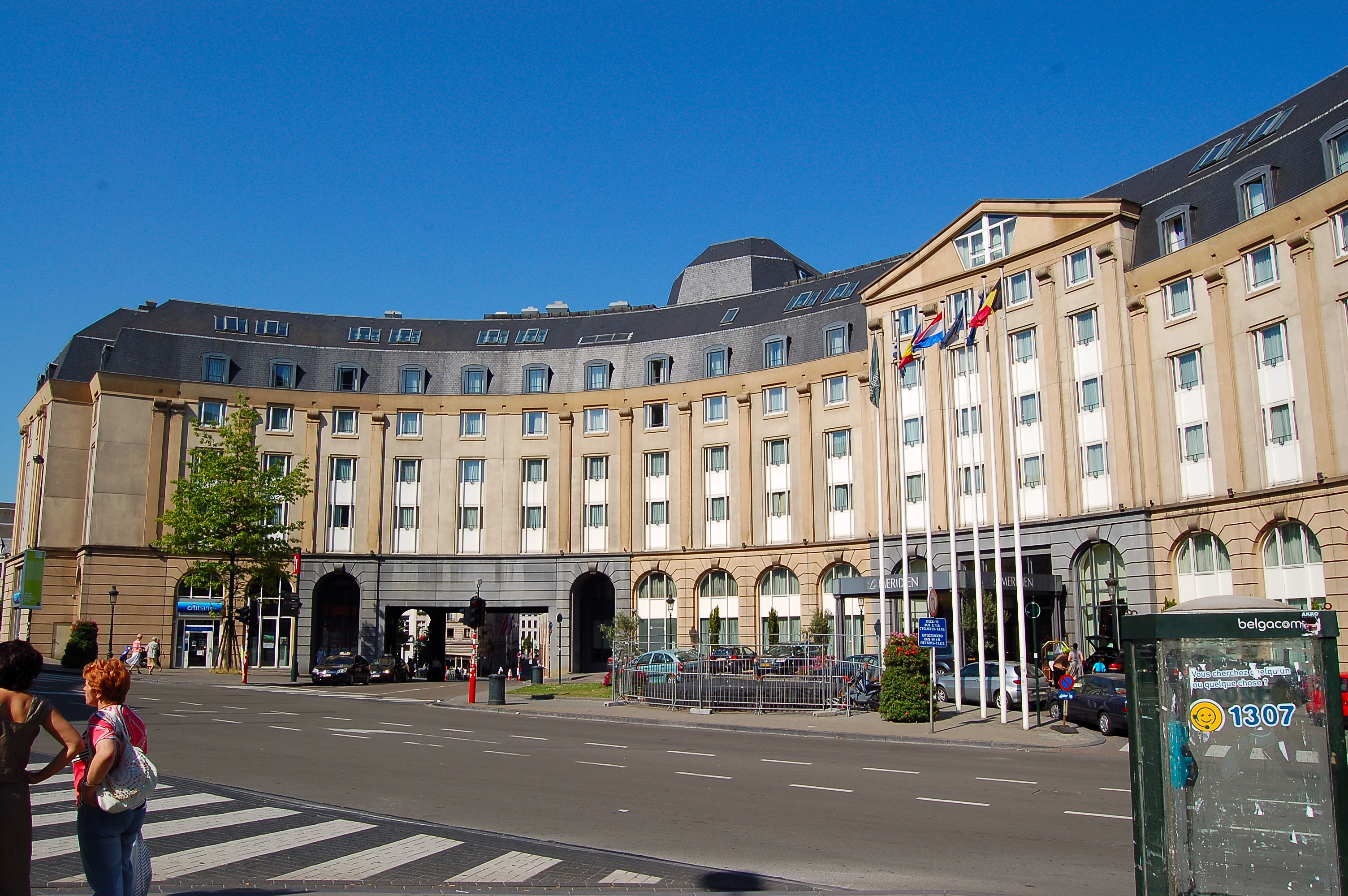 Brussels - Hotel Meridien